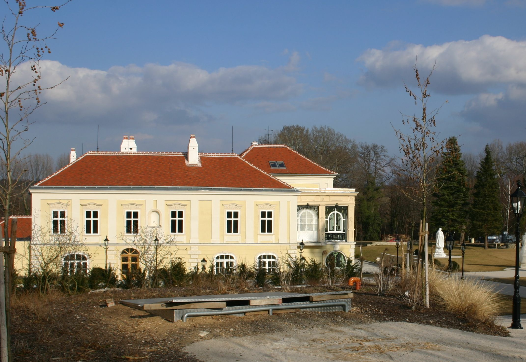 Schloss Draßburg von der Straßenseite, im Winter mit verhüllten Statuen